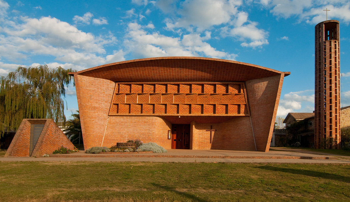 Iglesia de Cristo Obrero y Nuestra Señora de Lourdes. Ubicada en el departamento de Canelones